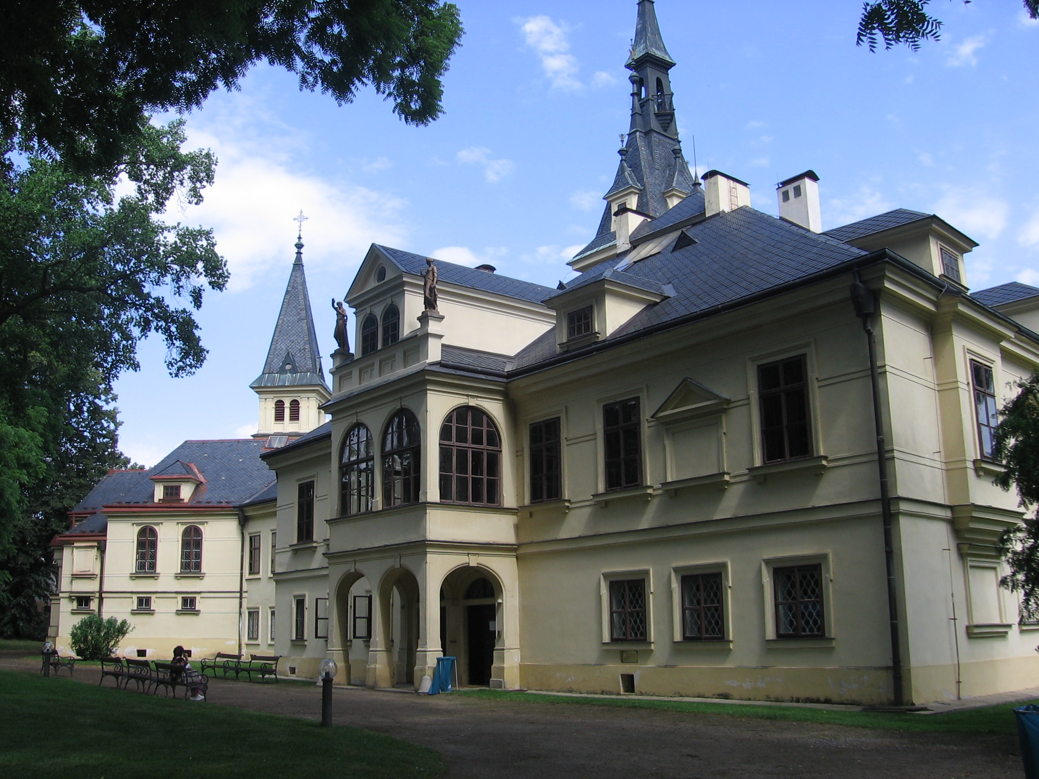 Zámek Lužany, okr.Plzeň-jih